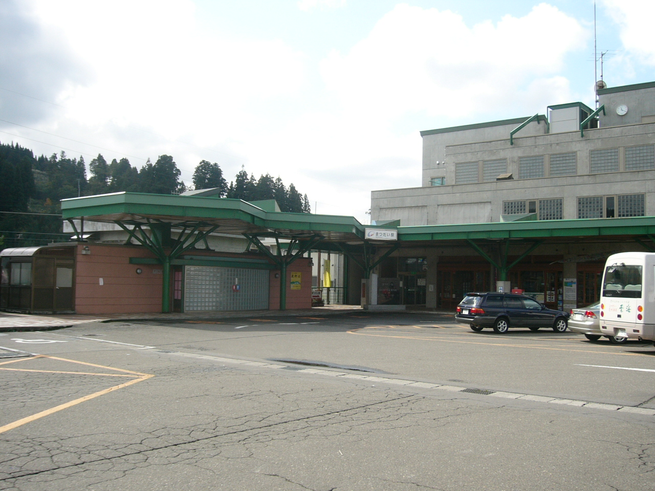 Matsudai Station